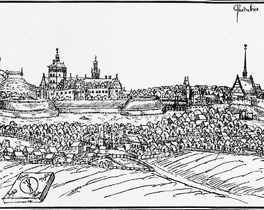 Veduta Pardubic z roku 1602.